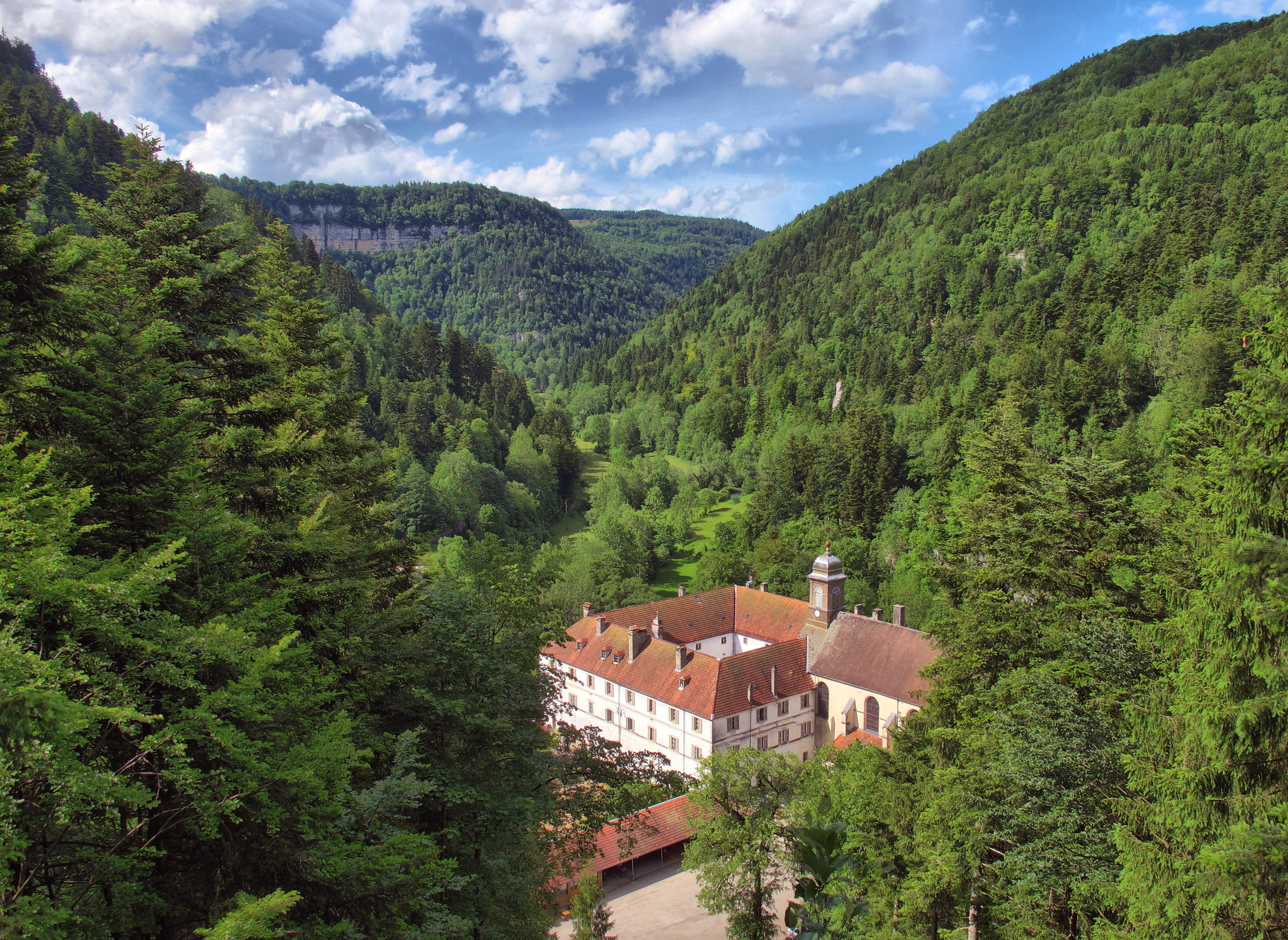 Classé au monument historique sous le numéro PA00101631